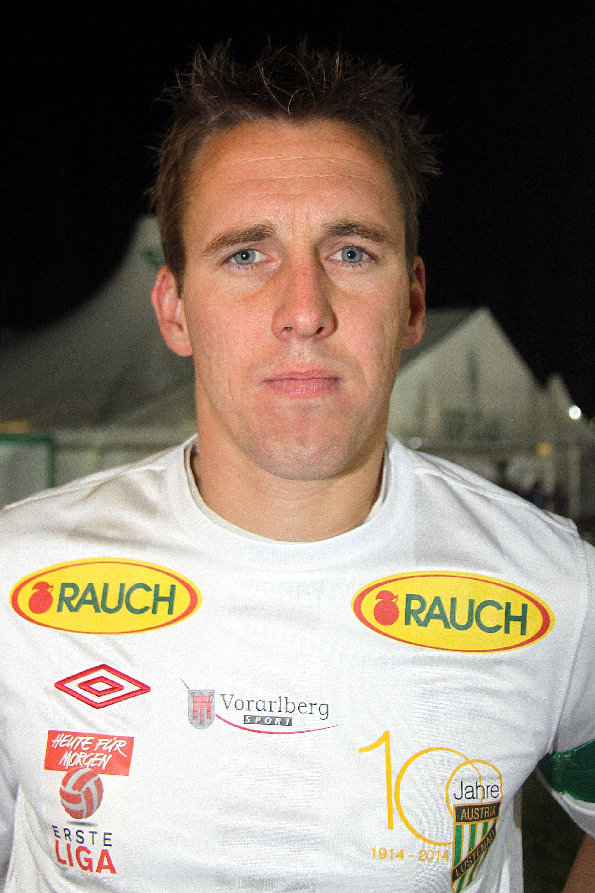 Meisterschaftsspiel der Ersten Liga: SV Mattersburg gegen SC Austria Lustenau (2:2) am 22. November 2013 im Mattersburger Pappelstadion. – Das Foto zeigt Christoph Stückler (SC Austria Lustenau).